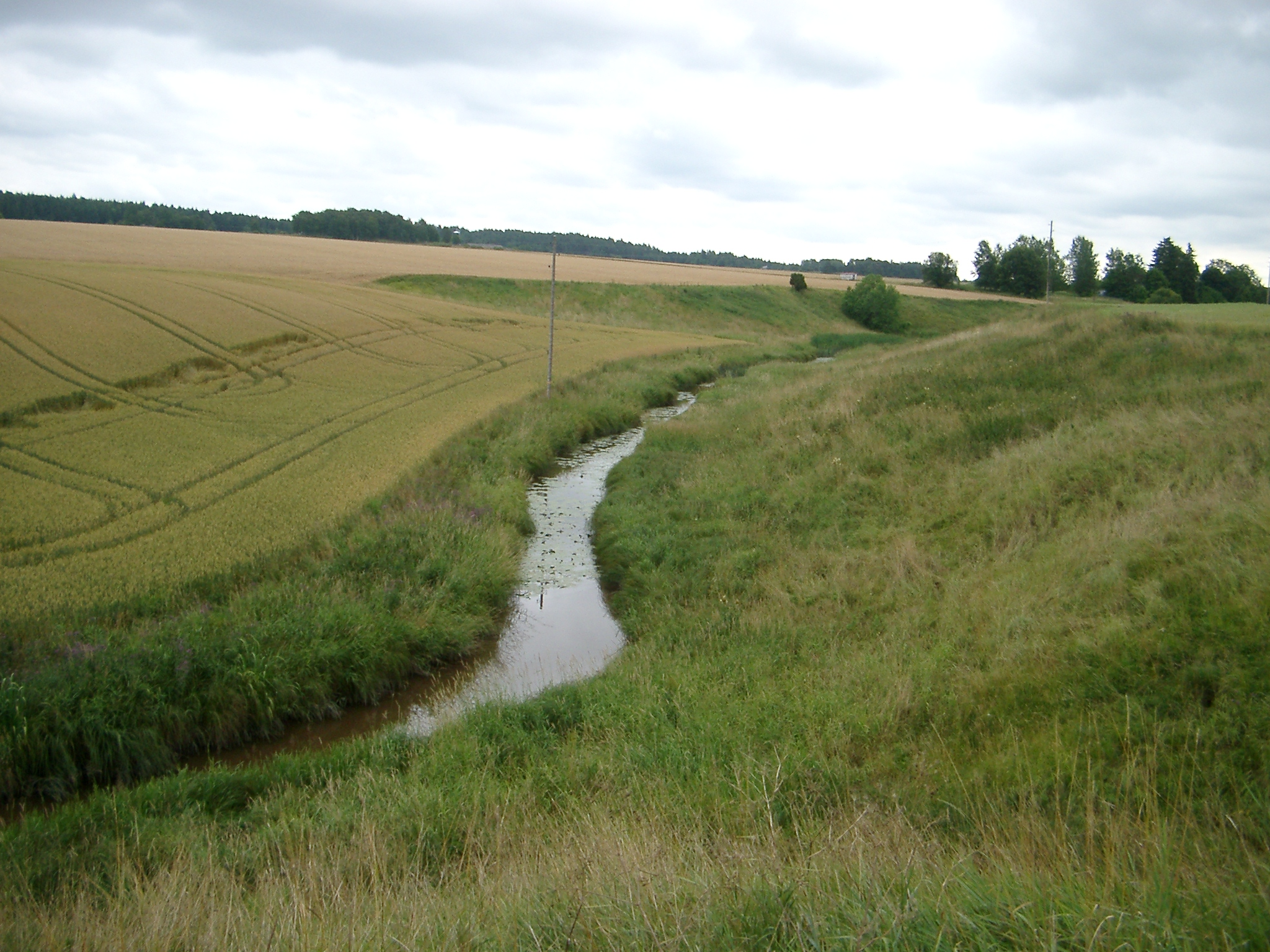 Skattmansöån i Uppsala län